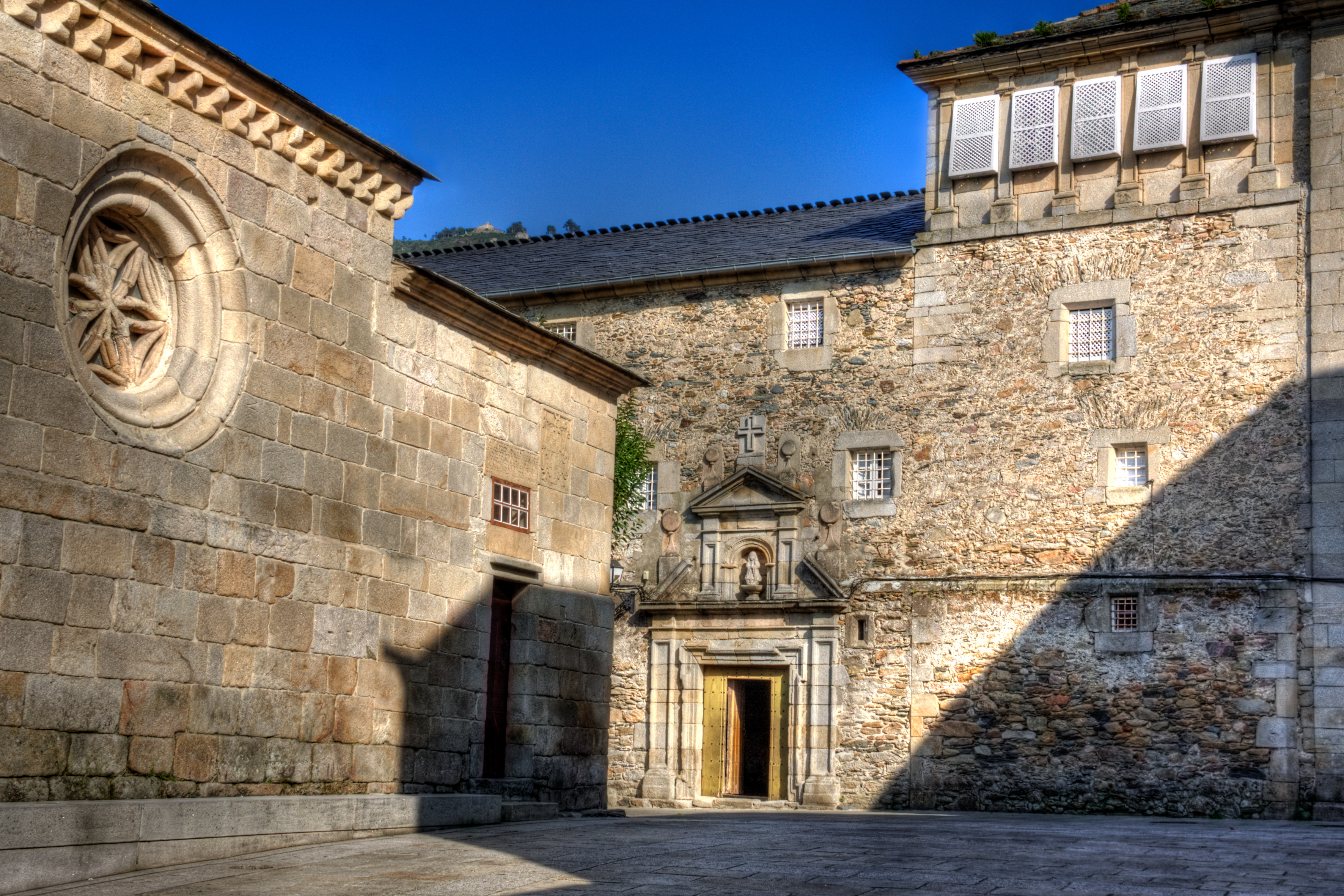 Viveiro, Iglesia de SantaMaria - Sacristia con el convento de la concepcionistas al fondo